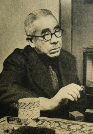 辰野隆